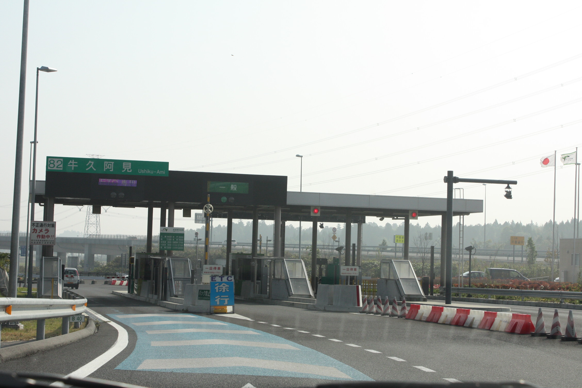 牛久阿見インターチェンジ